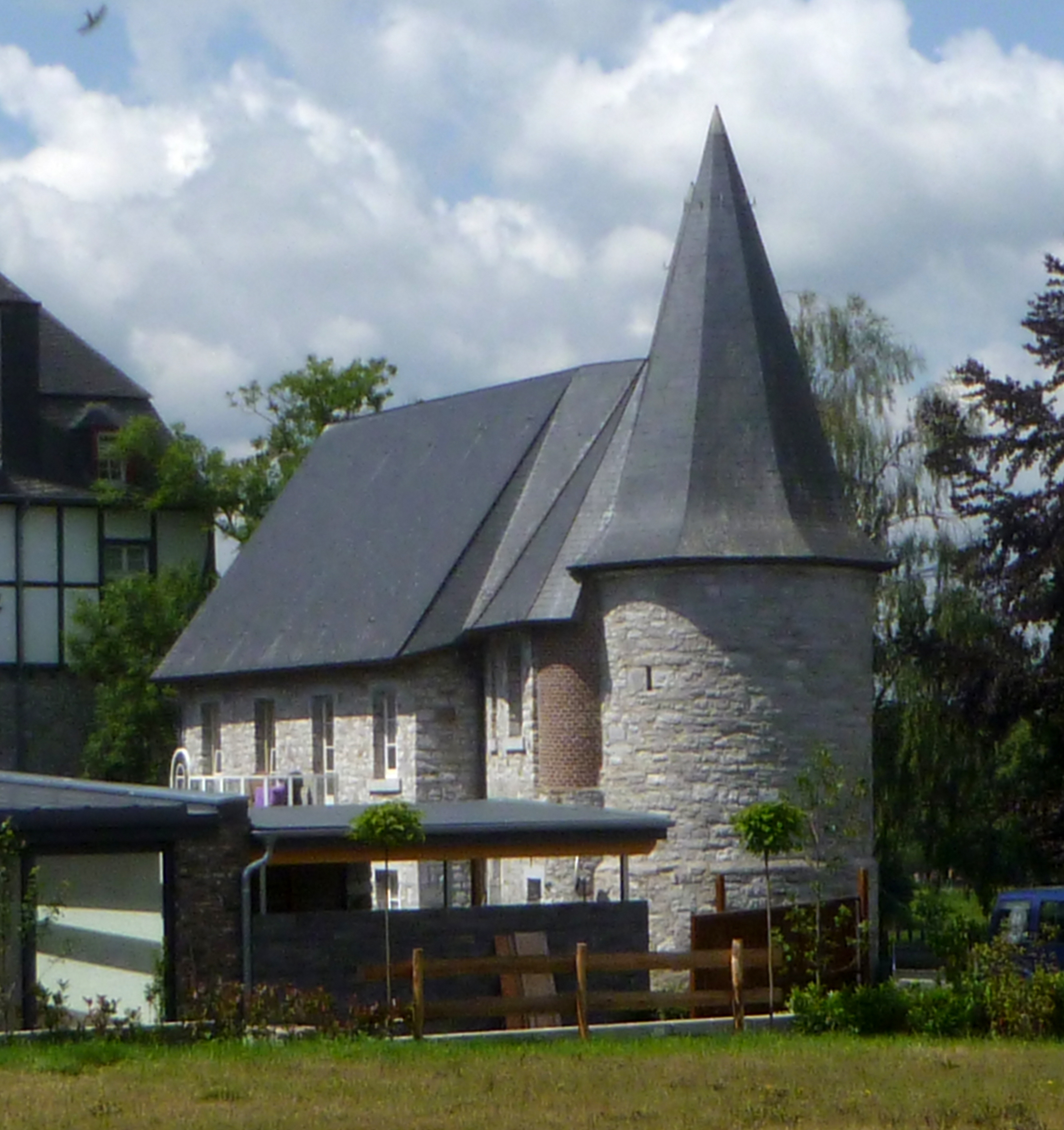 Vorburg von Schloss Libermé in Kettenis/Belgien - Rückseitenansicht Baudenkmal